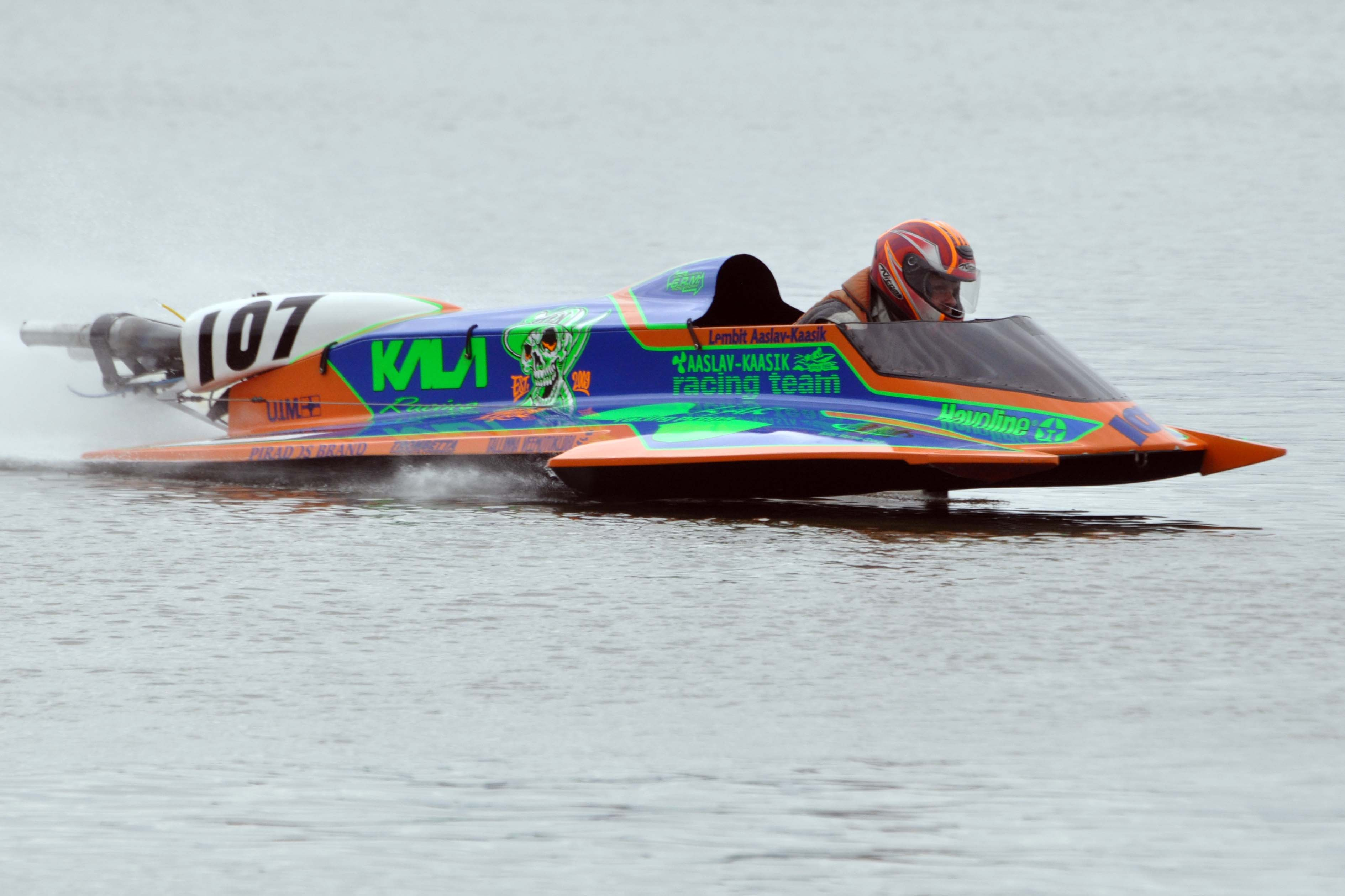 Lembit Aaslav-Kaasik O-250 maailmameister veemotos